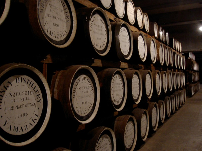 Barrels at Yamazaki Distillery